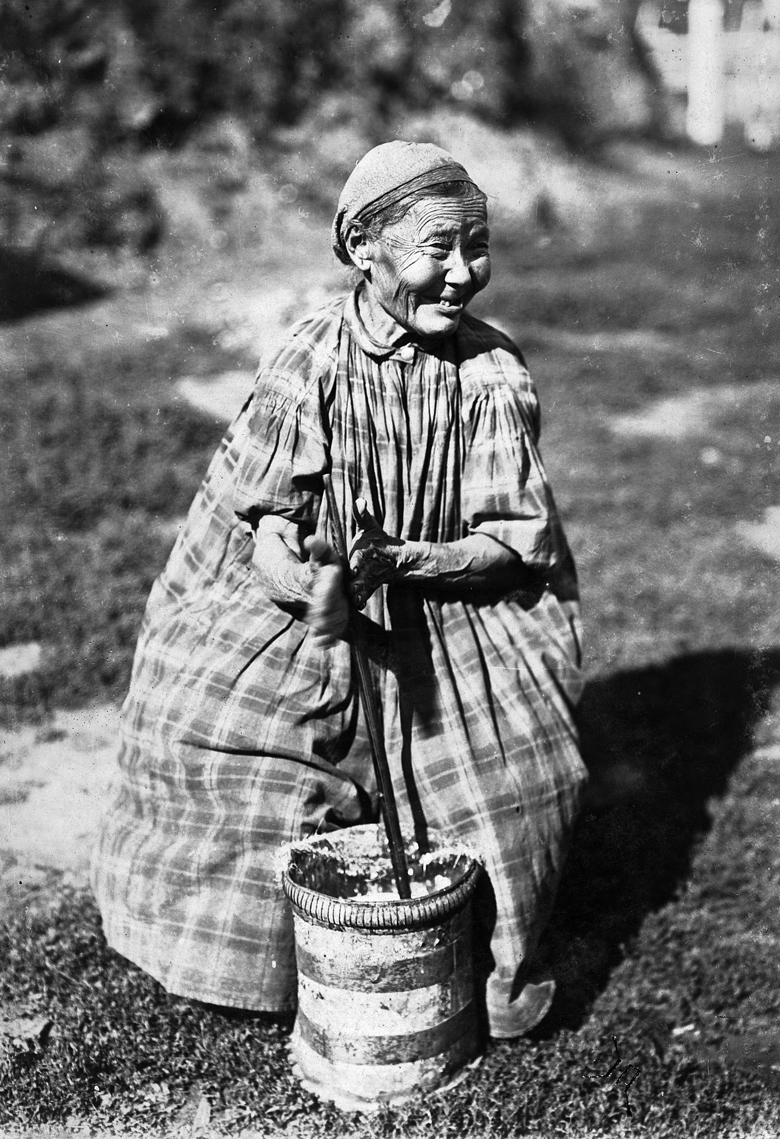 Якутка сбивает масло